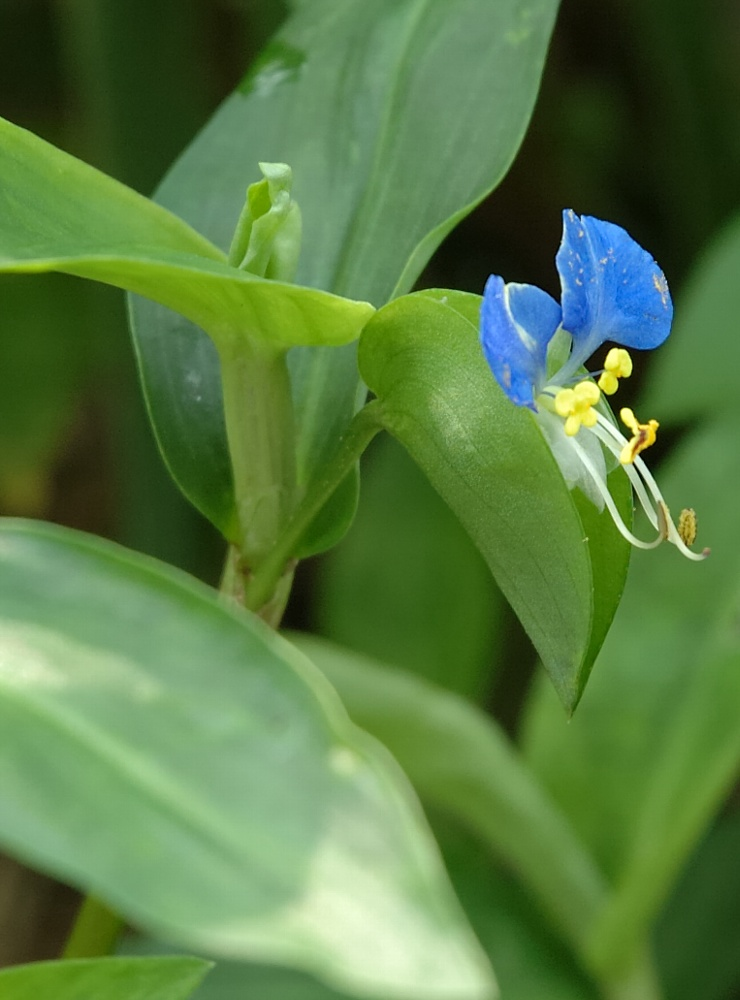 Commelina communis (ツユクサ)